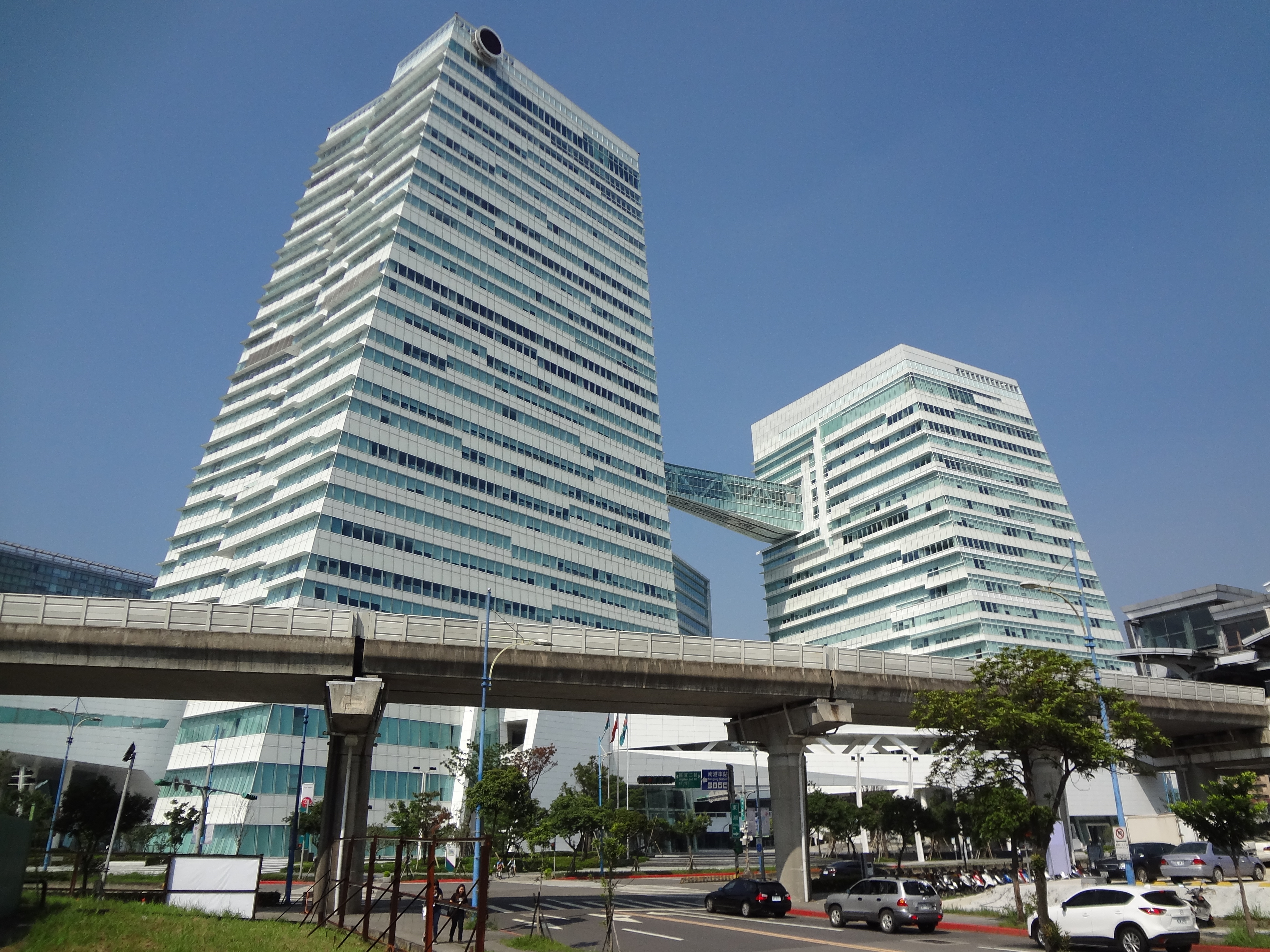 中國信託金融園區。